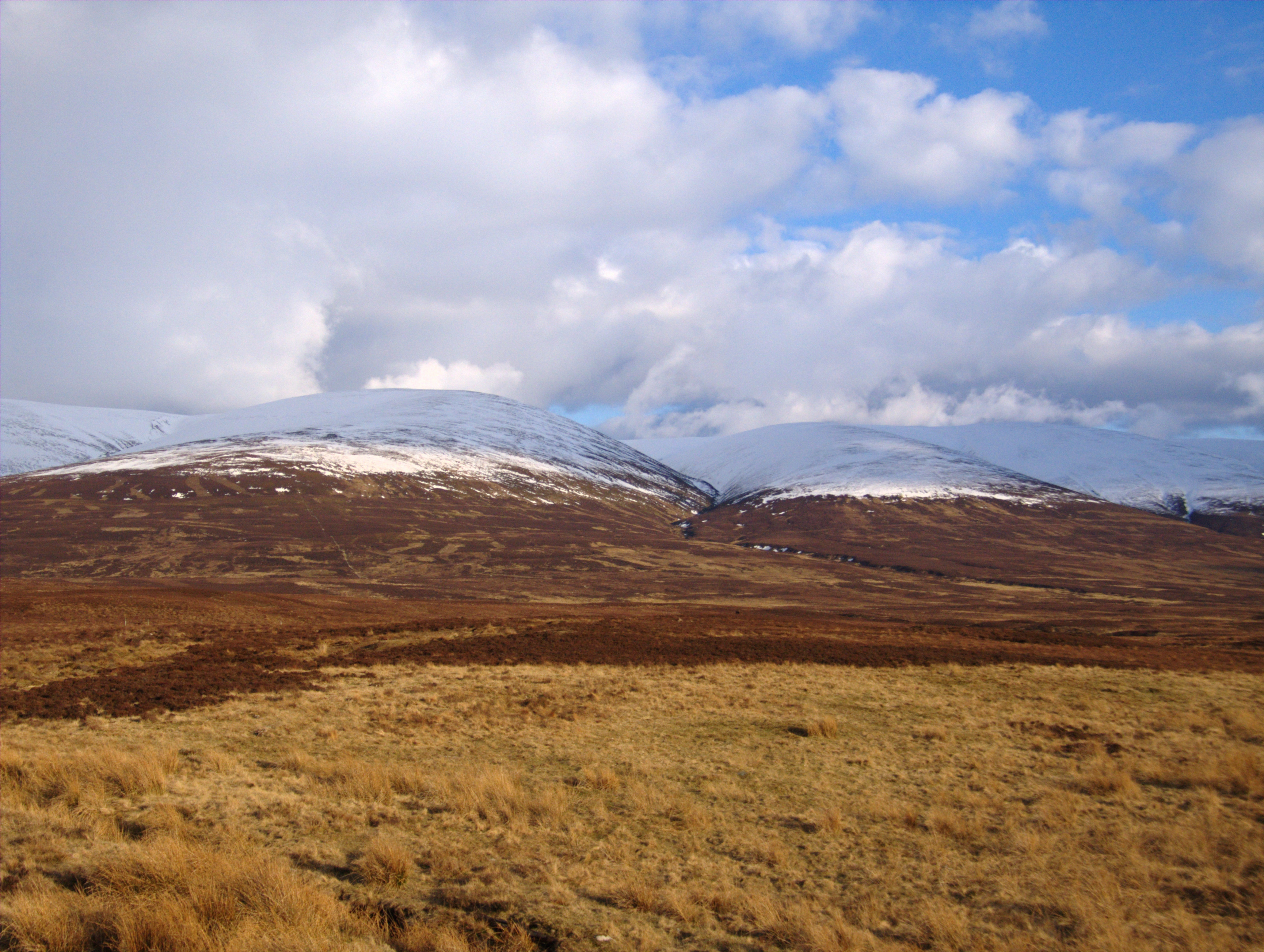 Carn na Caim